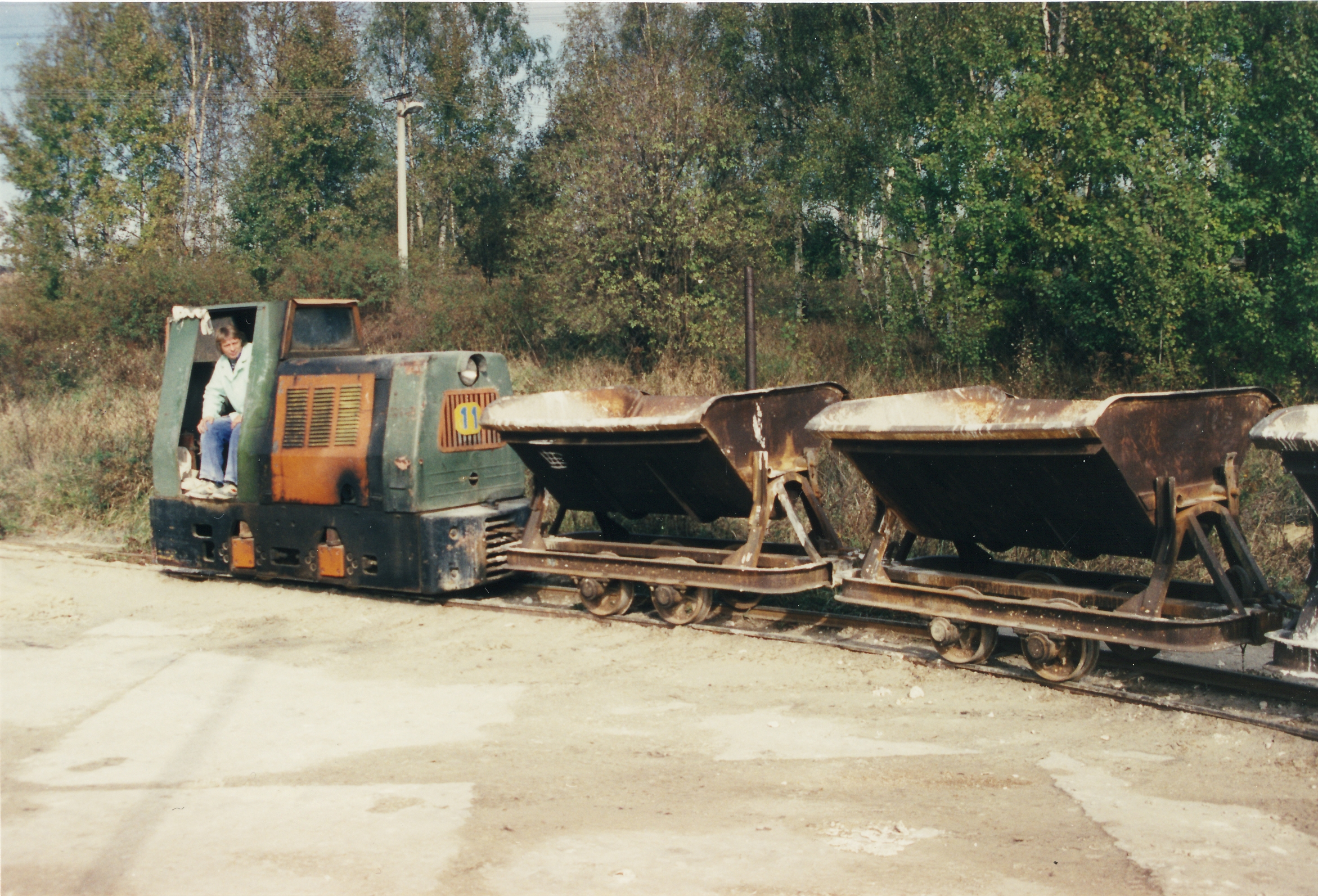 Karlovy Vary Dvory; cihelna; úzkorozchodná průmyslová dráha